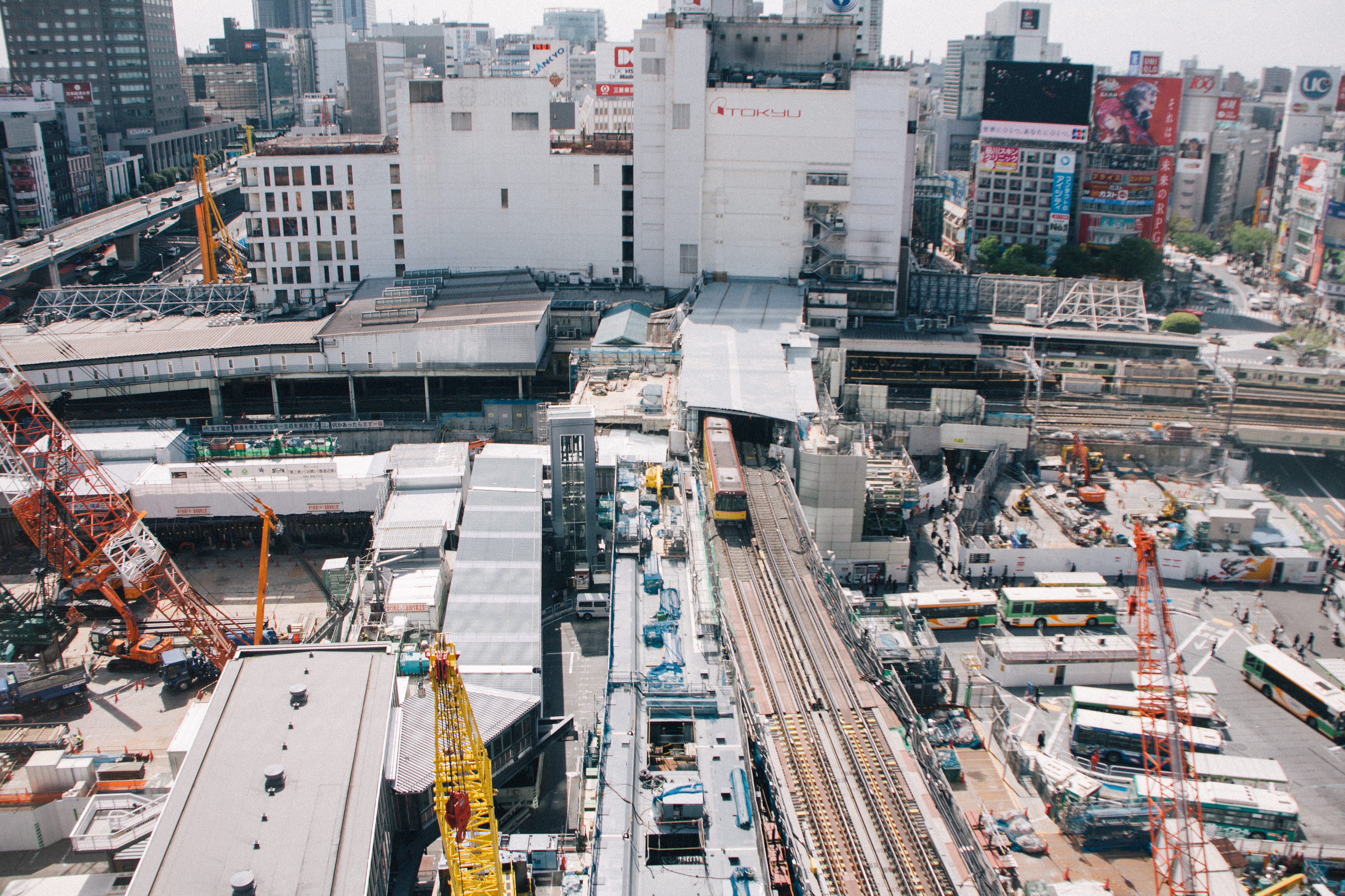 渋谷ヒカリエ 渋谷駅